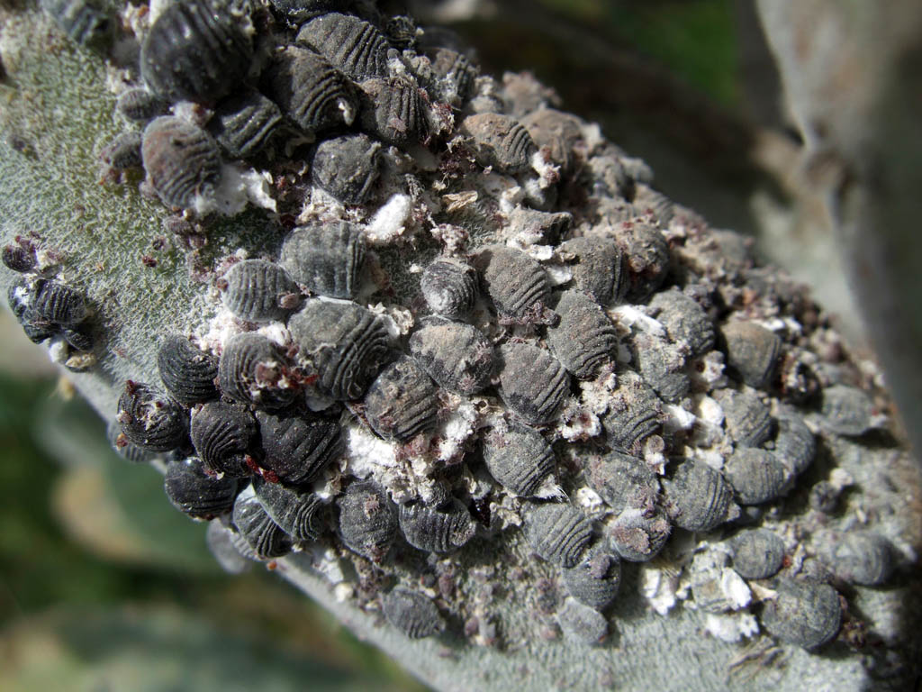 Cochineal on Opuntia cactus, La Palma